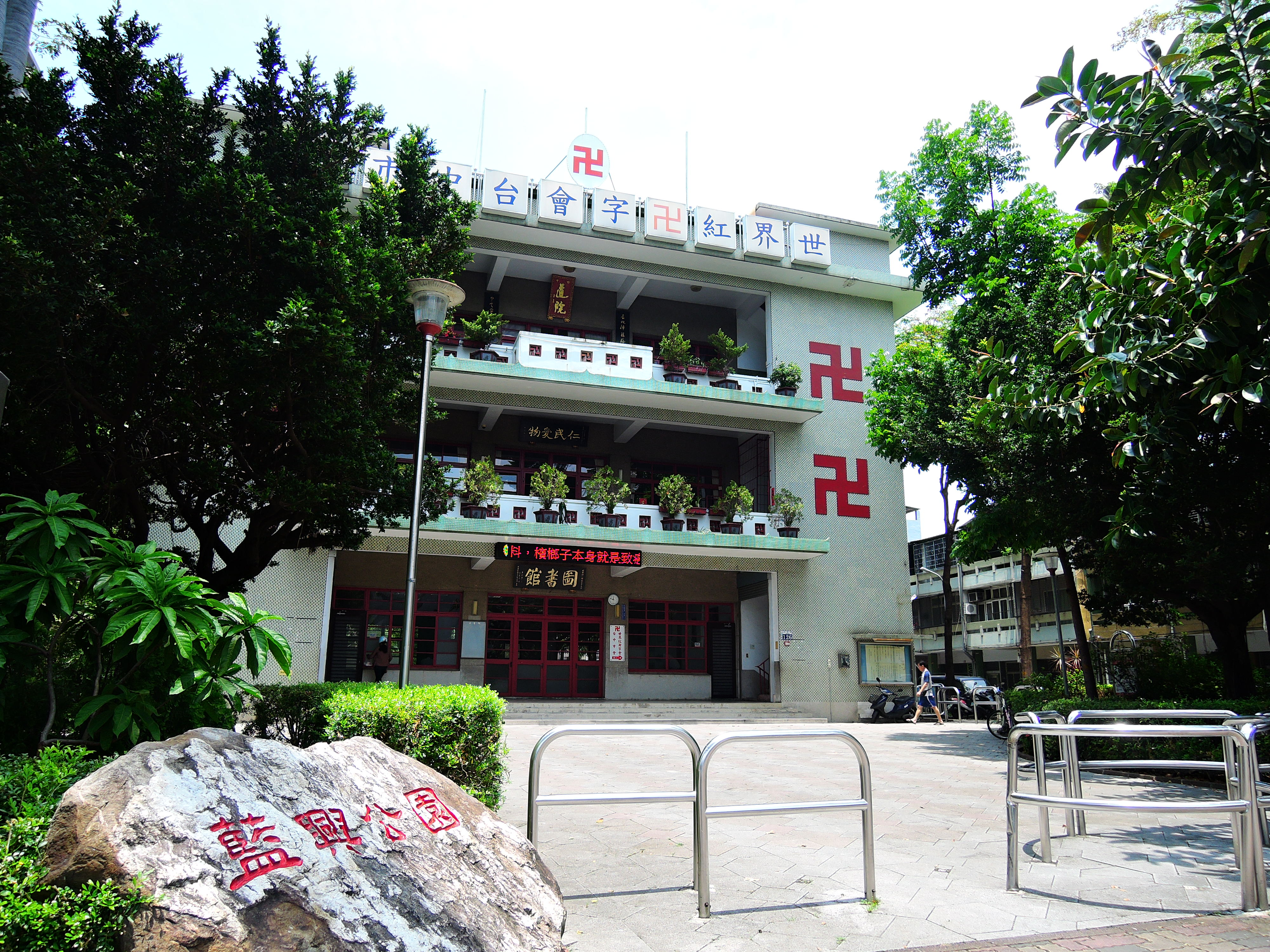 藍興里與藍興公園，該名稱應與墾號【藍張興】有所淵源